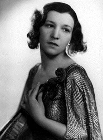 Arányi Jelly magyar hegedűművésznő.